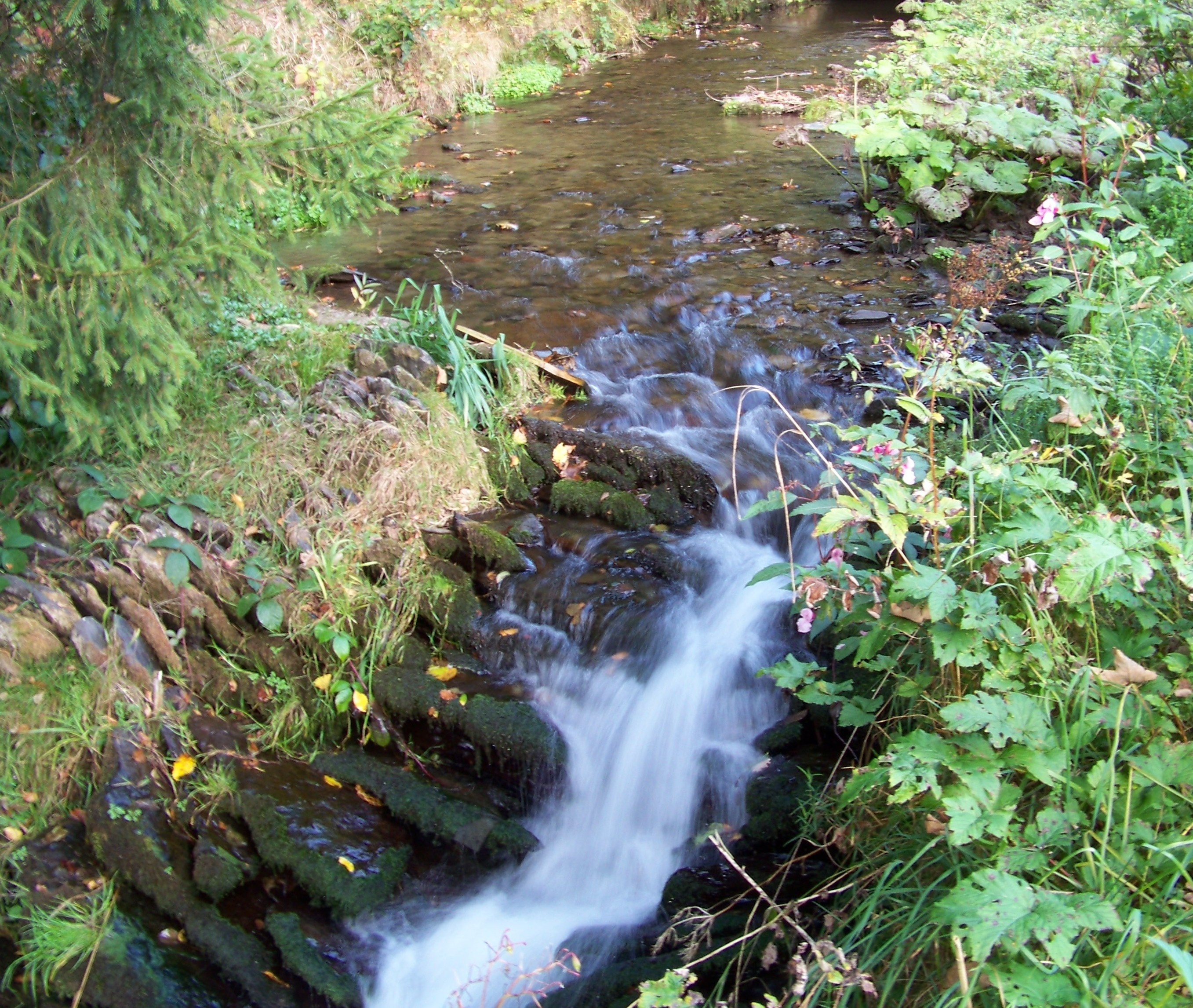 Latrop in Schmallenberg-Waidmannsruh (Germany)